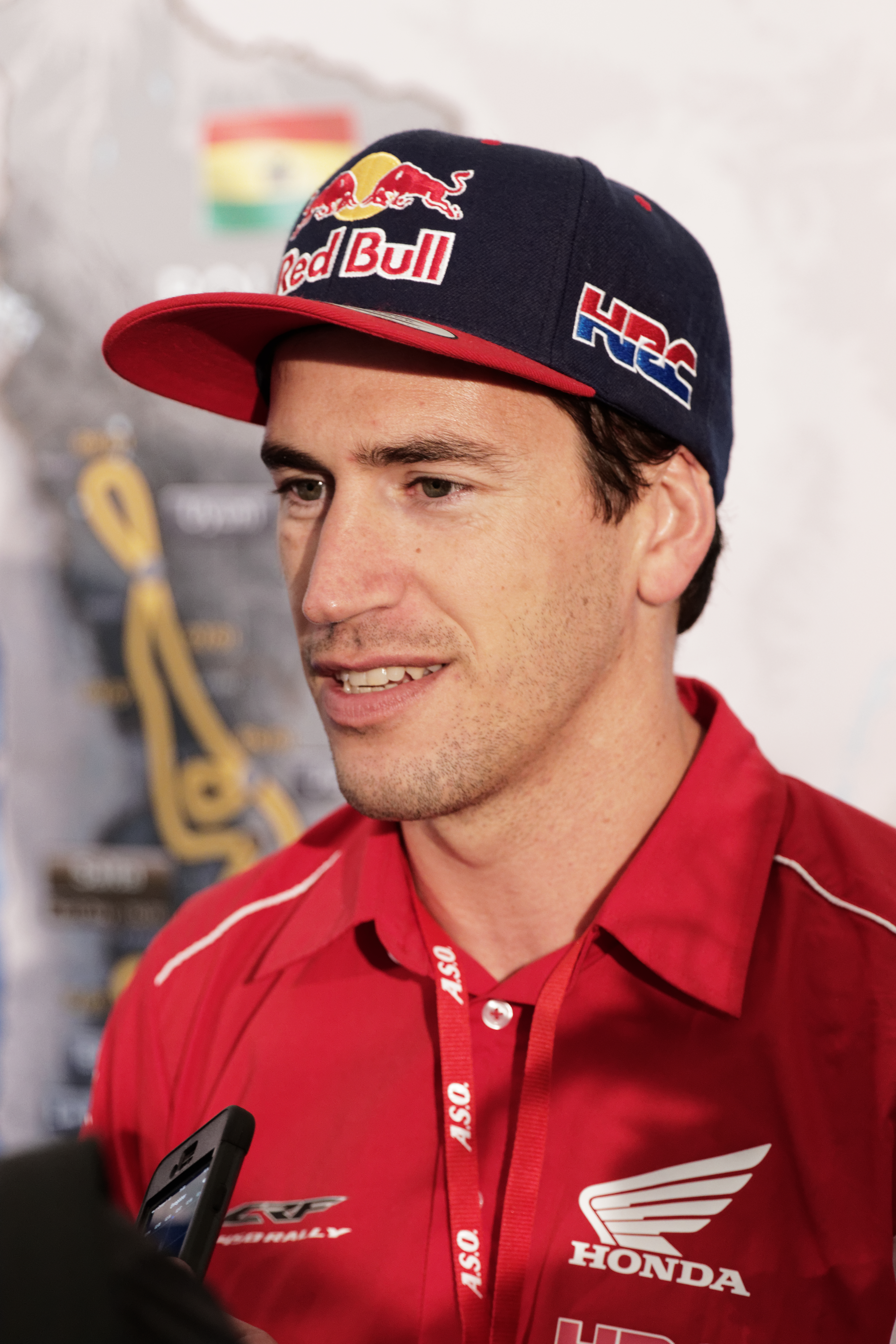 Conférence de presse du Dakar 2016.